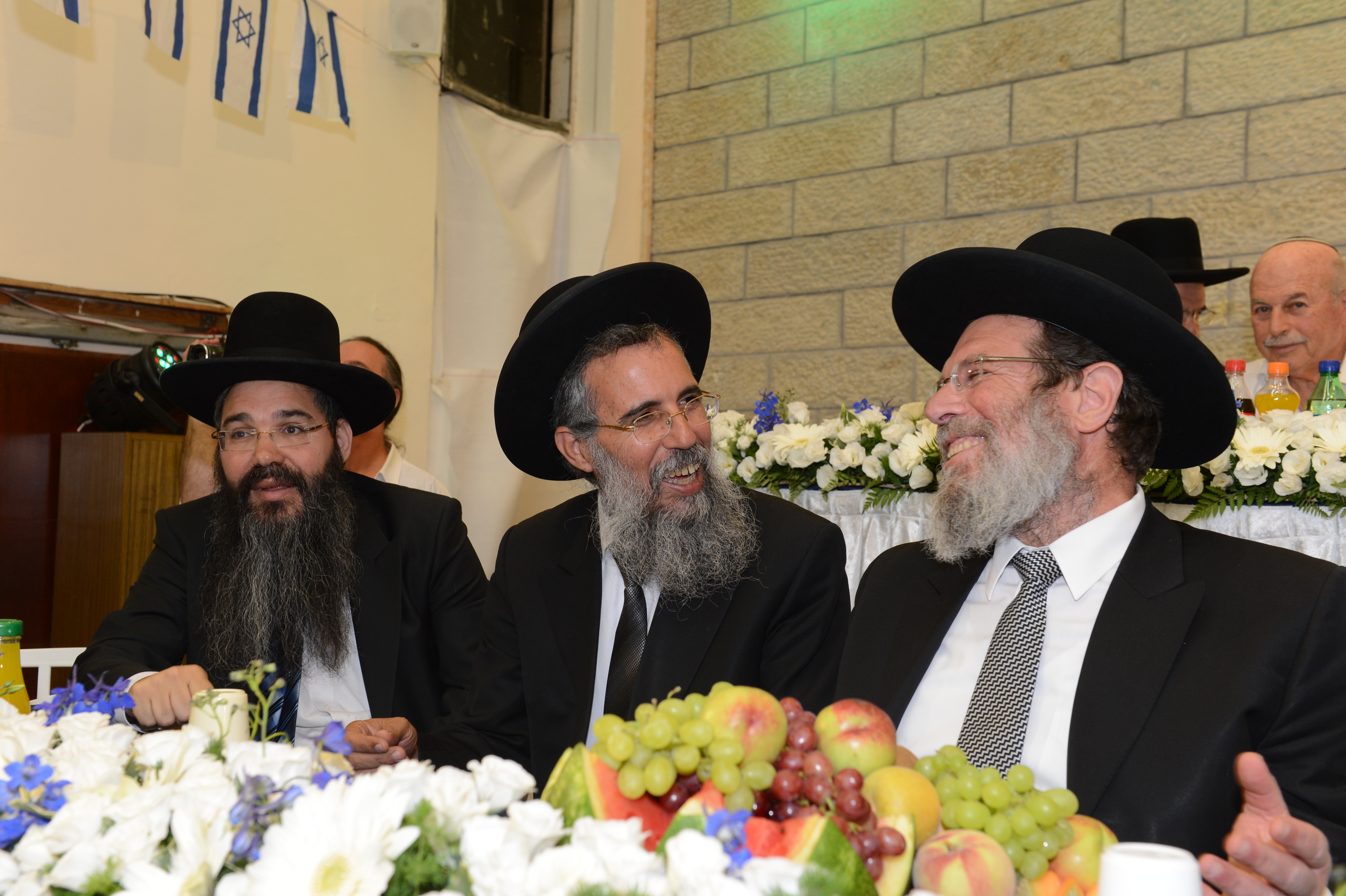 ישיבת מרכז הרב. הרב משה אמסלם בטקס יום ירושלים בישיבת מרכז הרב יחד עם הרב קלמן בר והרב ציון לוז, תשע"ה.